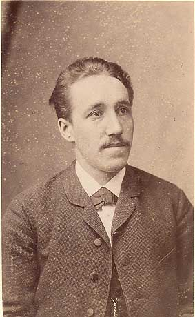 Porträt von Eberhard Savary